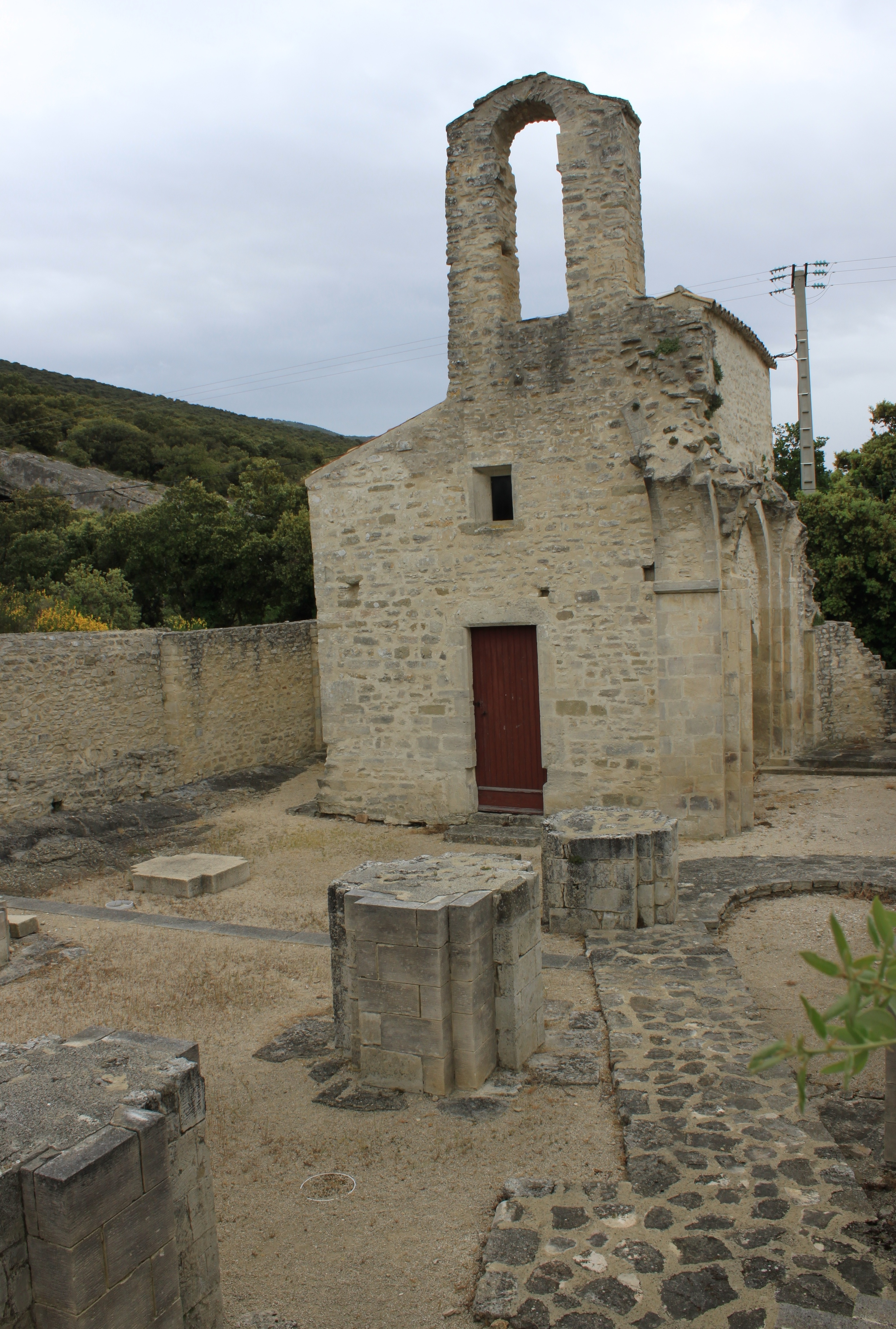 Ruines du prieuré clunisien de Montbrison-sur-Lez (26, France)